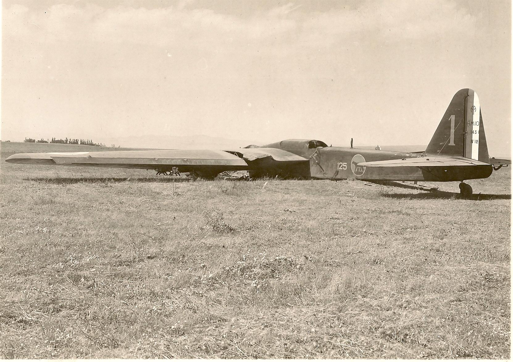 Avion Amiot-143 n° 125 crashé à la suite d'un atterrissage trop long. L'avion arrivé en bout de piste a buté sur un muret de terre où le train s'est arraché. Une autre photo montre les traces sur le petit talus. La mitrailleuse arrière pend sur le côté. L'avion porte en insigne la « louve romaine ».